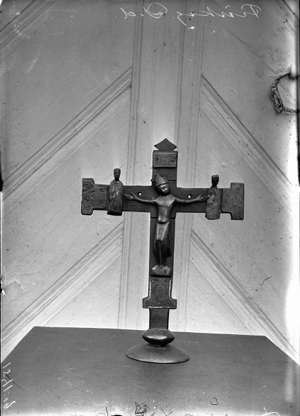 Krucifix. Snabbinv. Kategori: (05) KrucifixKrucifix. Snabbinv.